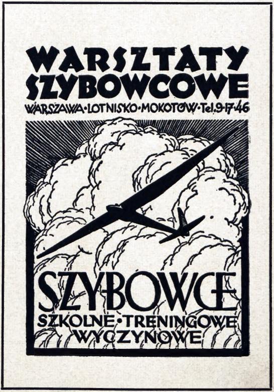 Reklama Warsztatów Szybowcowych w Warszawie zamieszczona w Skrzydlatej Polsce w 1939 r.